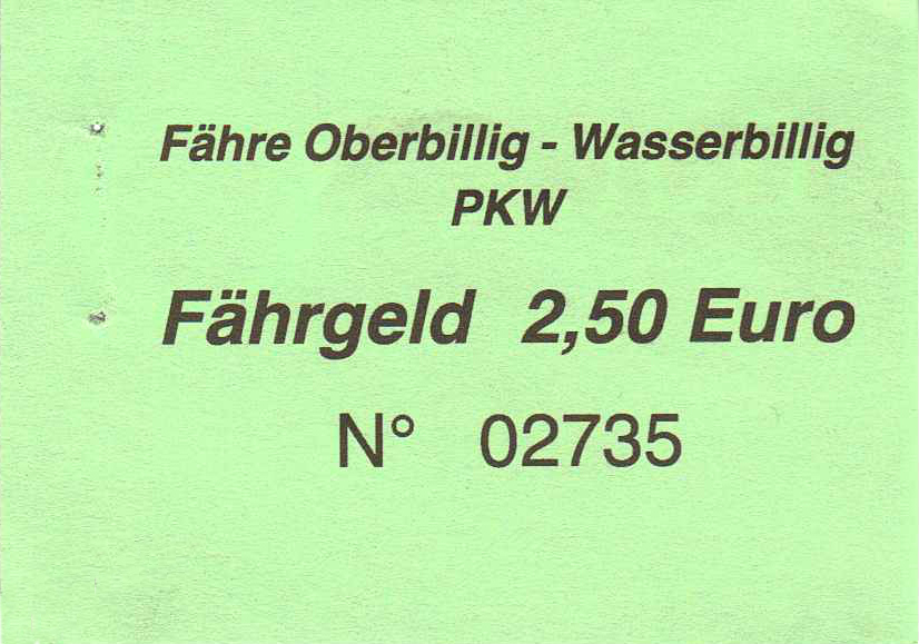 Fährticket Oberbillig-Wasserbillig PKW 2012